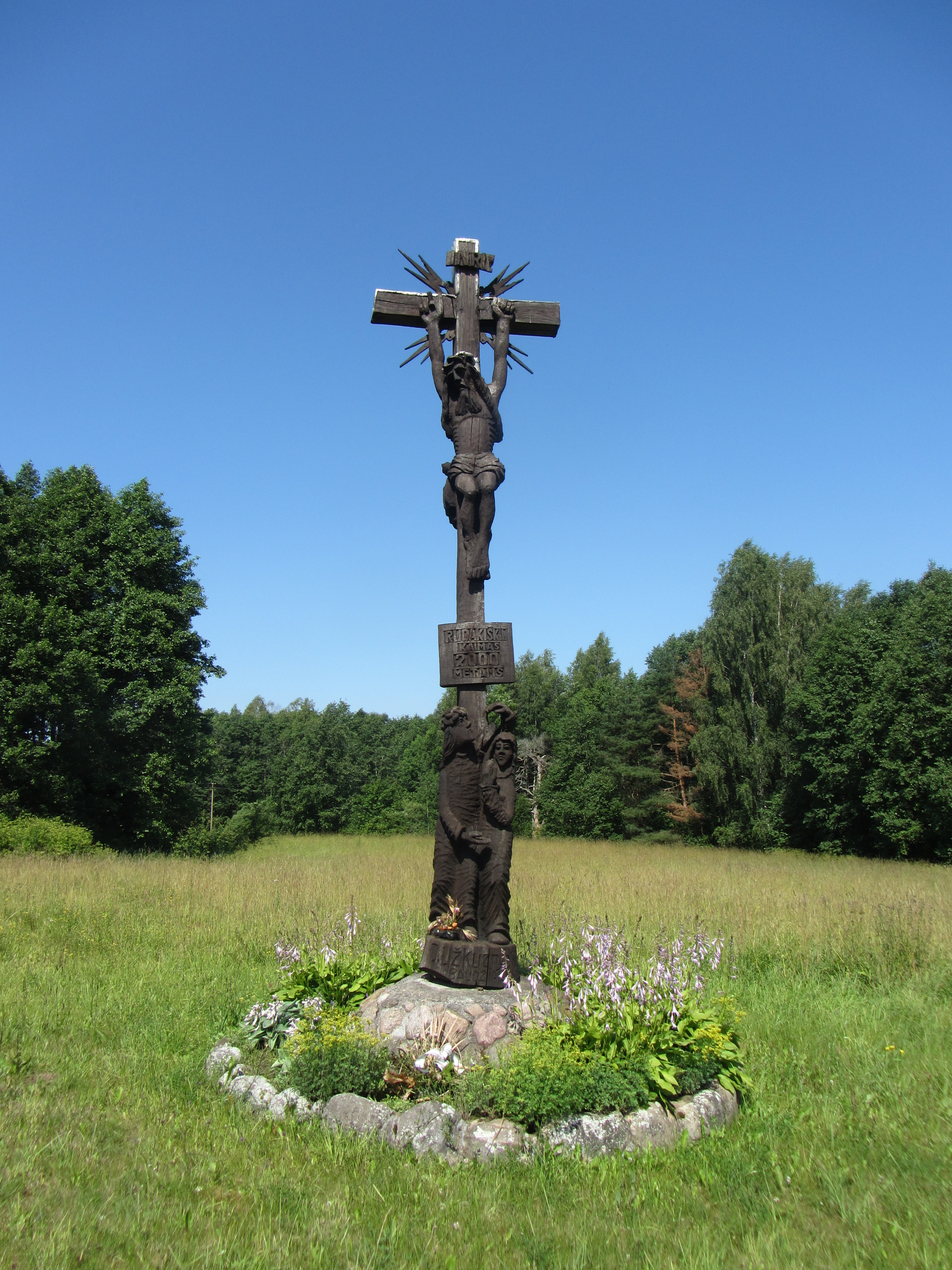 Salako sen., Lithuania